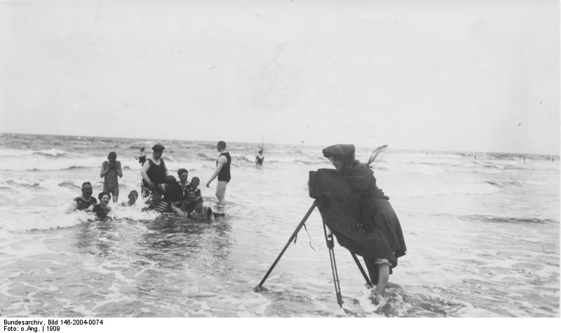 So badete man damals! In Schleier und mit hochgekrempelten Hosen macht die Strandfotografin ihre Aufnahmen. Borkum 1909